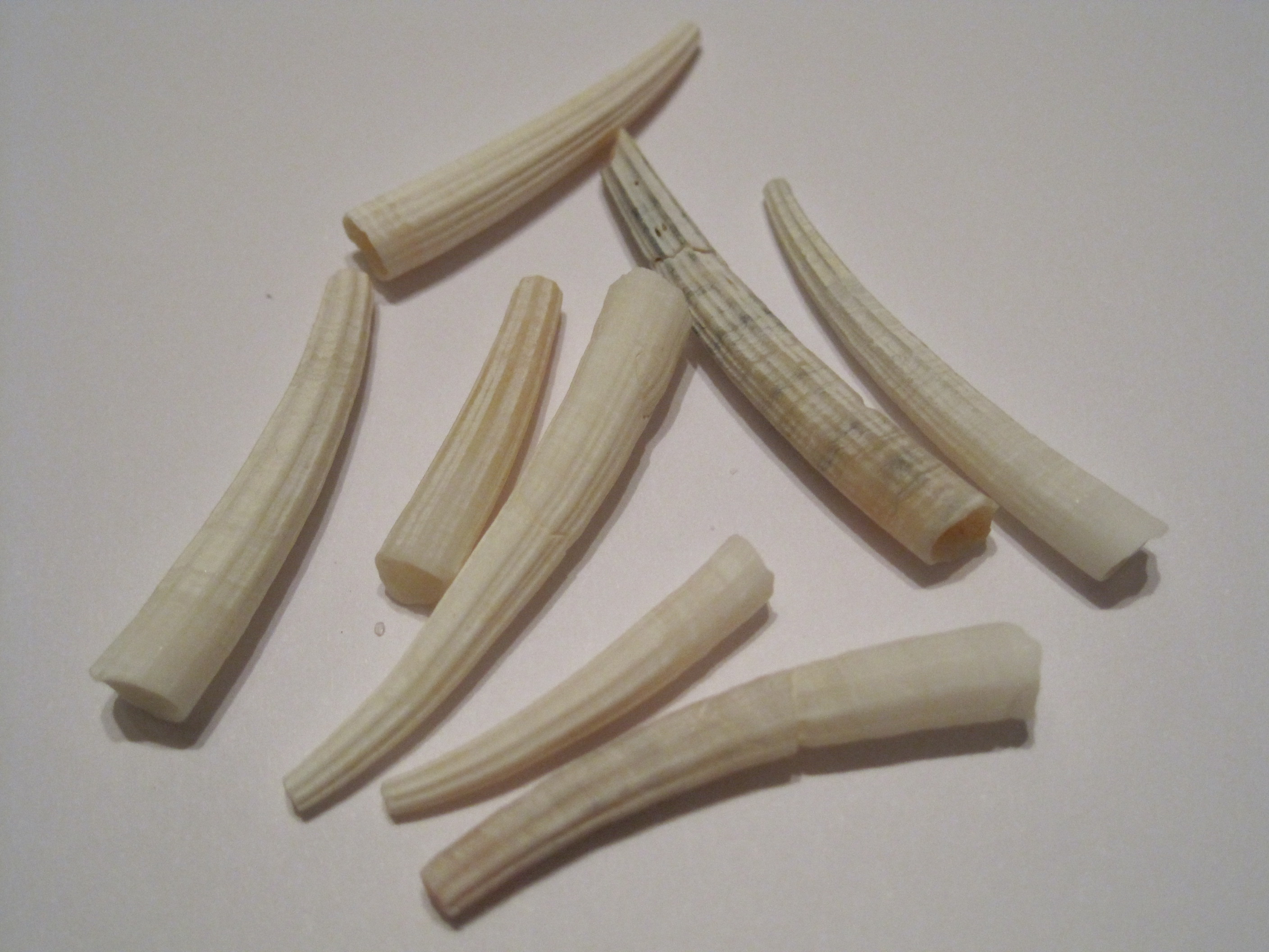 Conchas de Dentalium